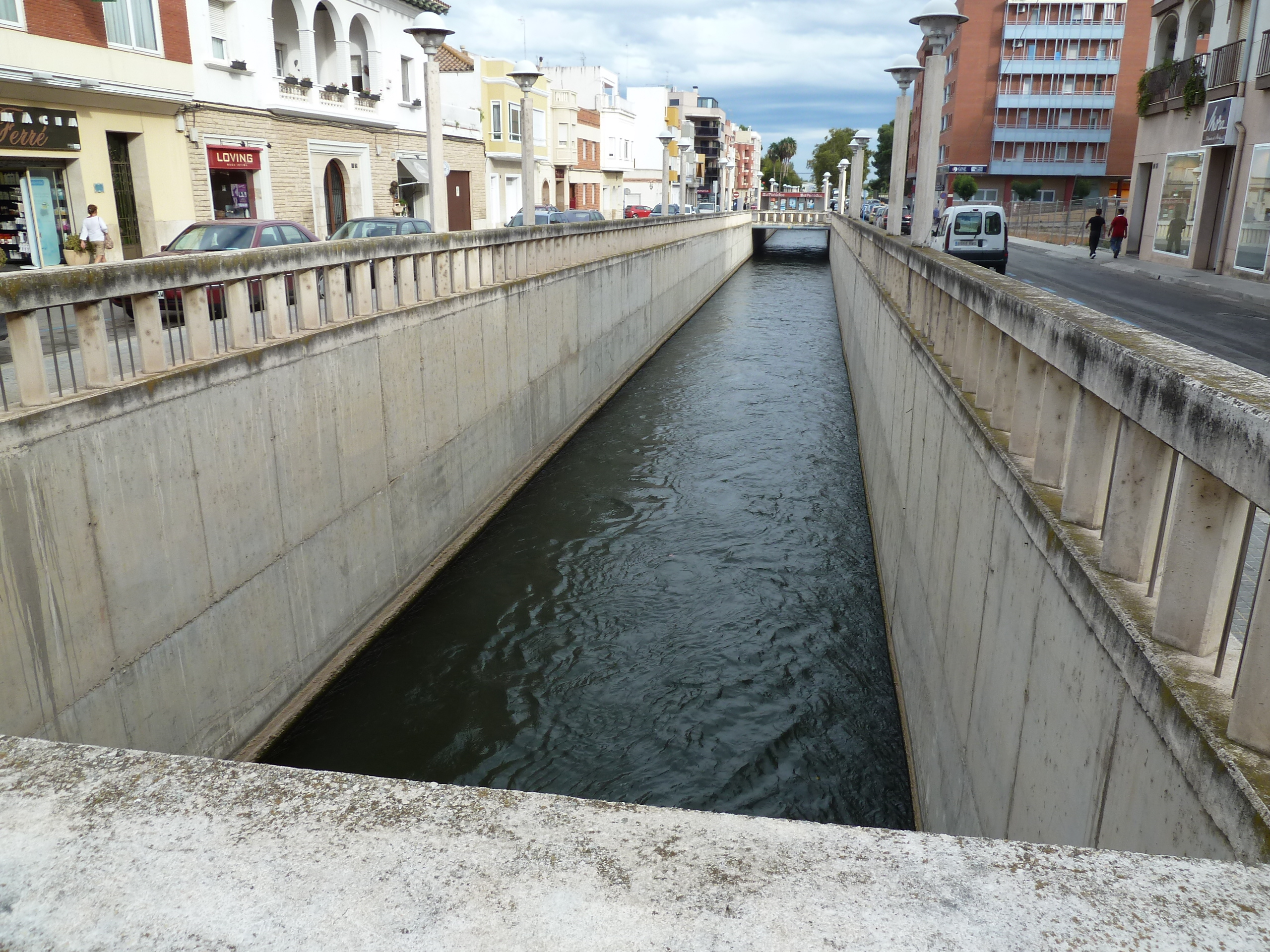 Amposta